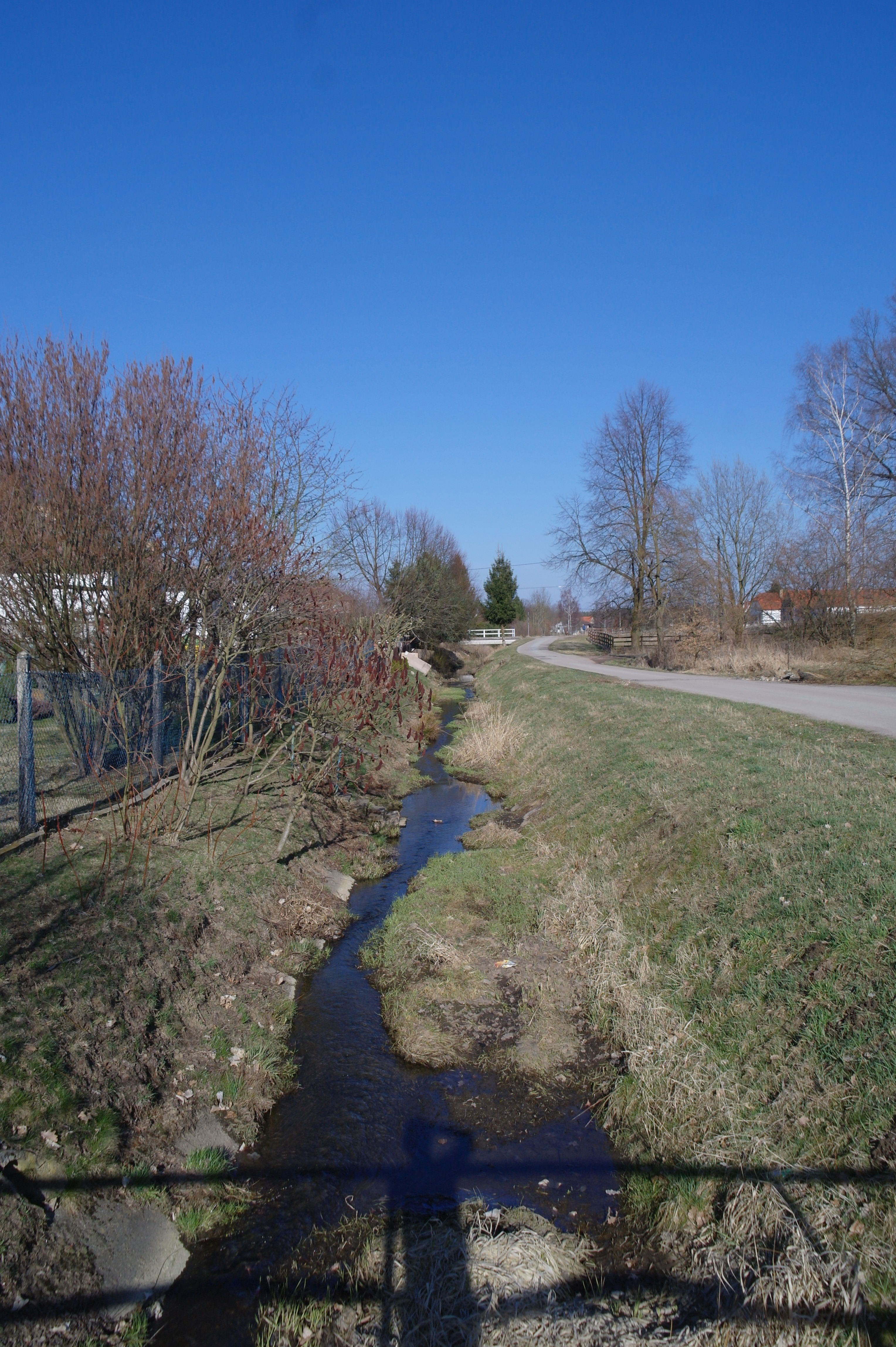 Hůrky, Hůrecký potok